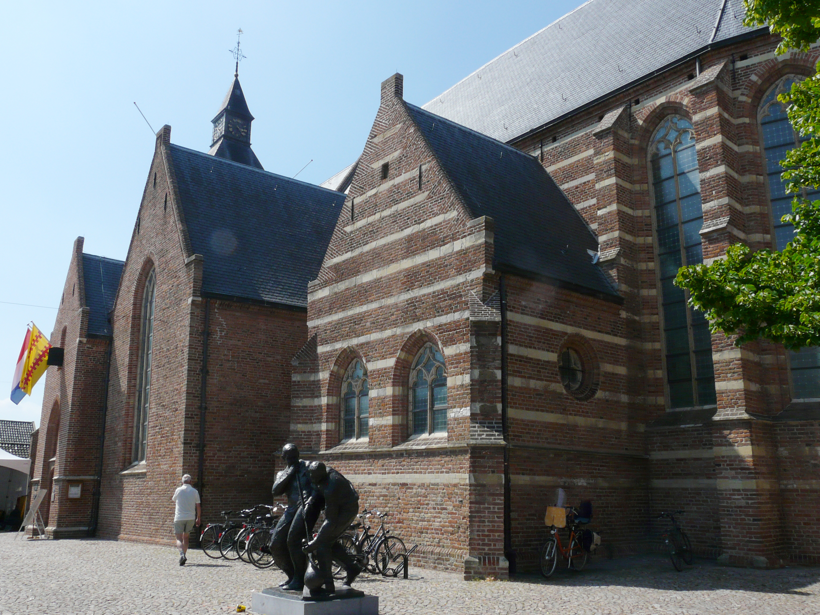 Zicht op de Grote Kerk gevestigd aan de Kerkstraat 32 gelegen in het centrum van Leerdam